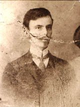 Петър Чаулев като млад.